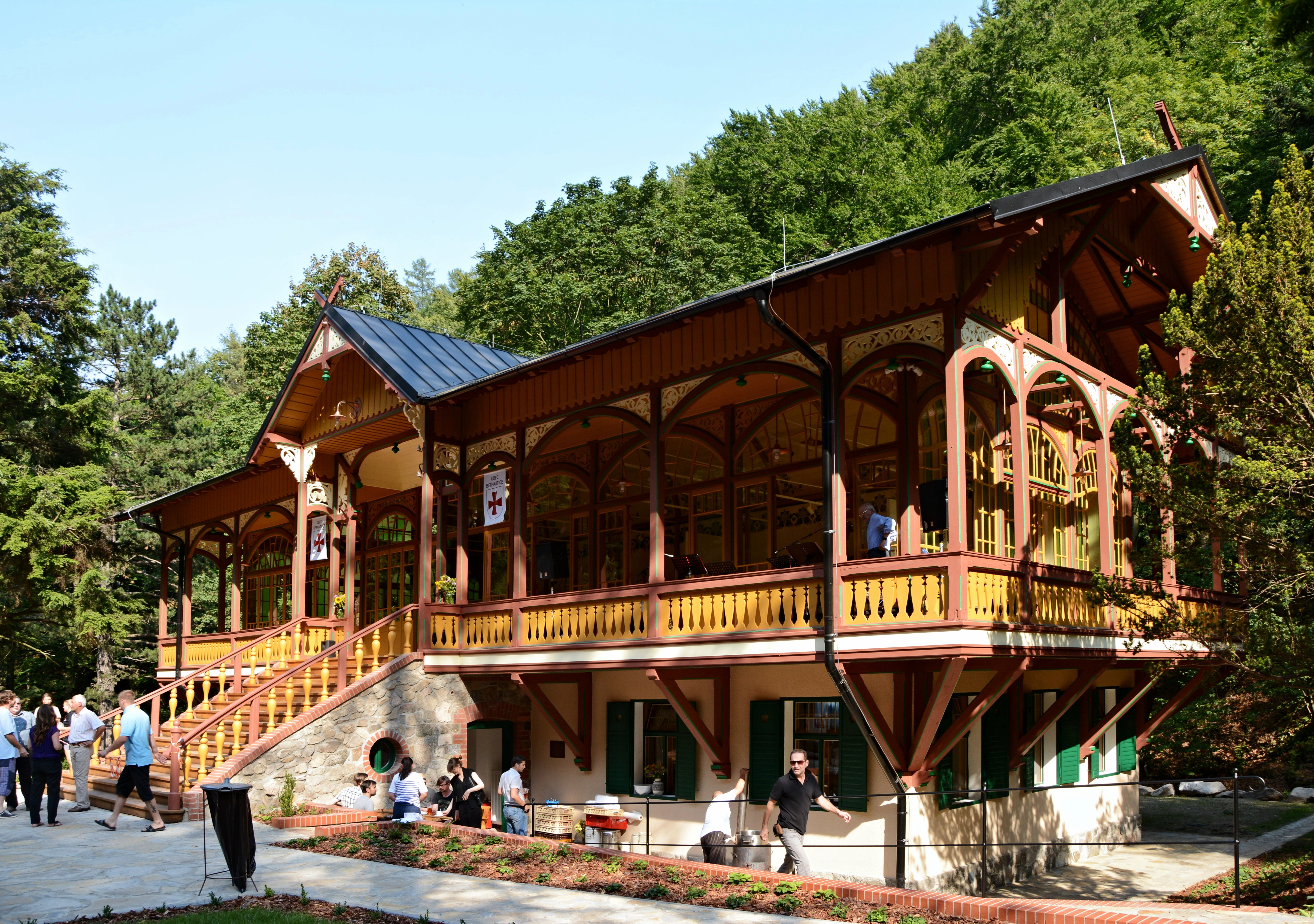 Tančírna v Račím údolí u Javorníka v den otevření po ukončené rekonstrukci